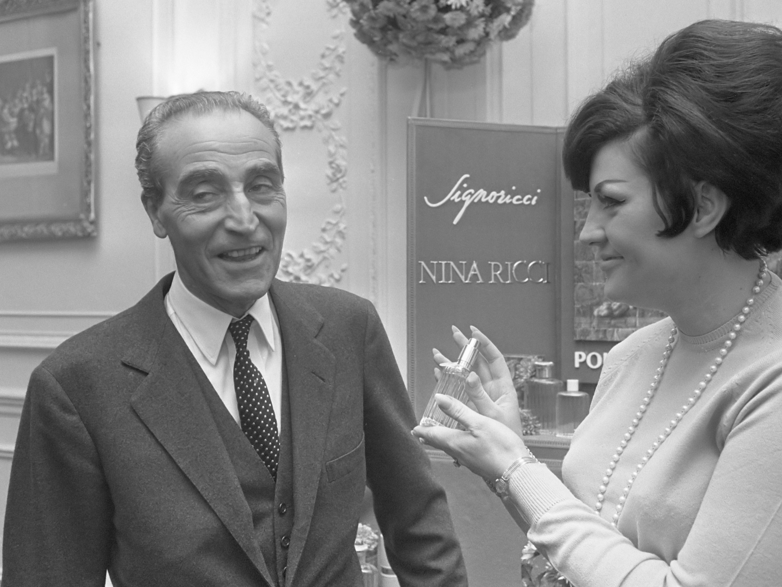 Parfum voor de man. De Italiaanse Roberto Ricci van het in Parijs gevestigde Haute Couturehuis Nina Ricci (genoemd naar zijn moeder) met een spuitbusje parfum van eigen fabricaat 16 november 1966